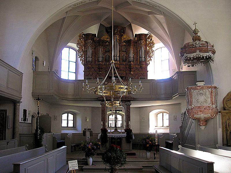 Evangelische Pfarrkirche Hl. Dreifaltigkeit (Rentweinsdorf, Landkreis Haßberge, Unterfranken). Chor und Kanzel. Eigene Aufnahme, Juli 2007 / Protestant parish church Holy Trinity at Rentweinsdorf (Lower Franconia, Germany). Choir and pulpit. Own photo, July 2007